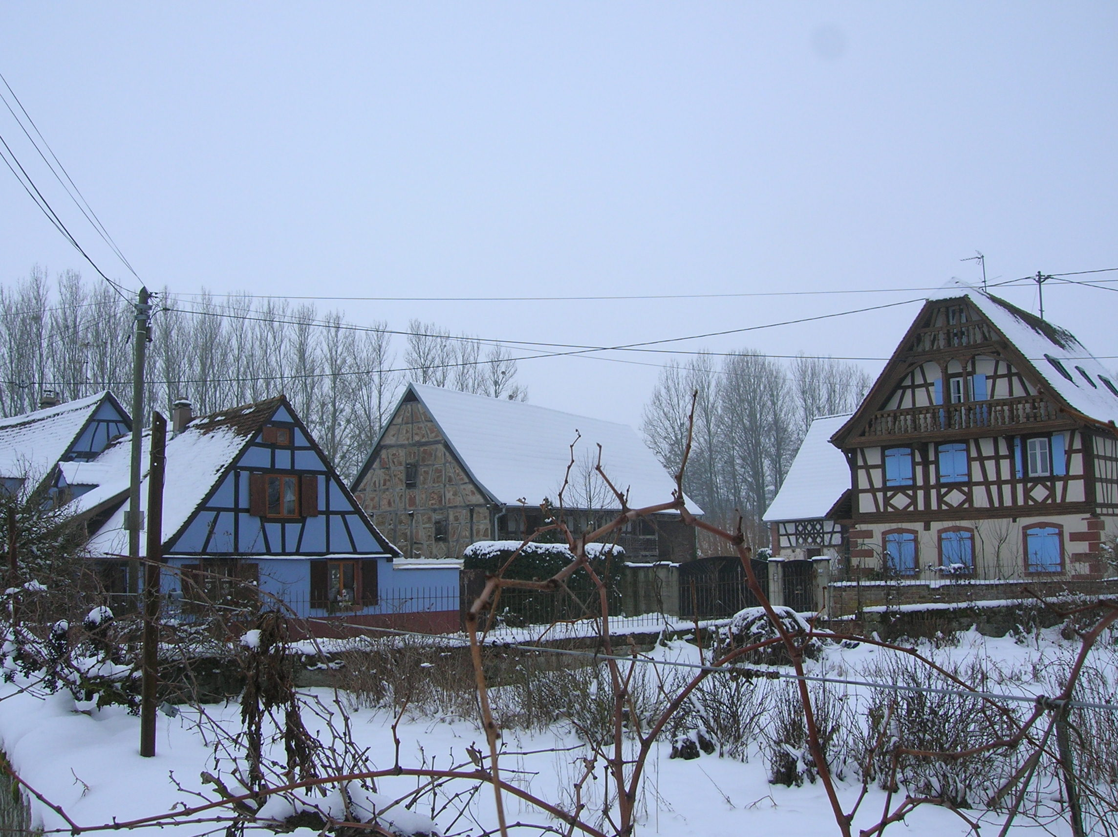 Nídermodere, Unterelsàss